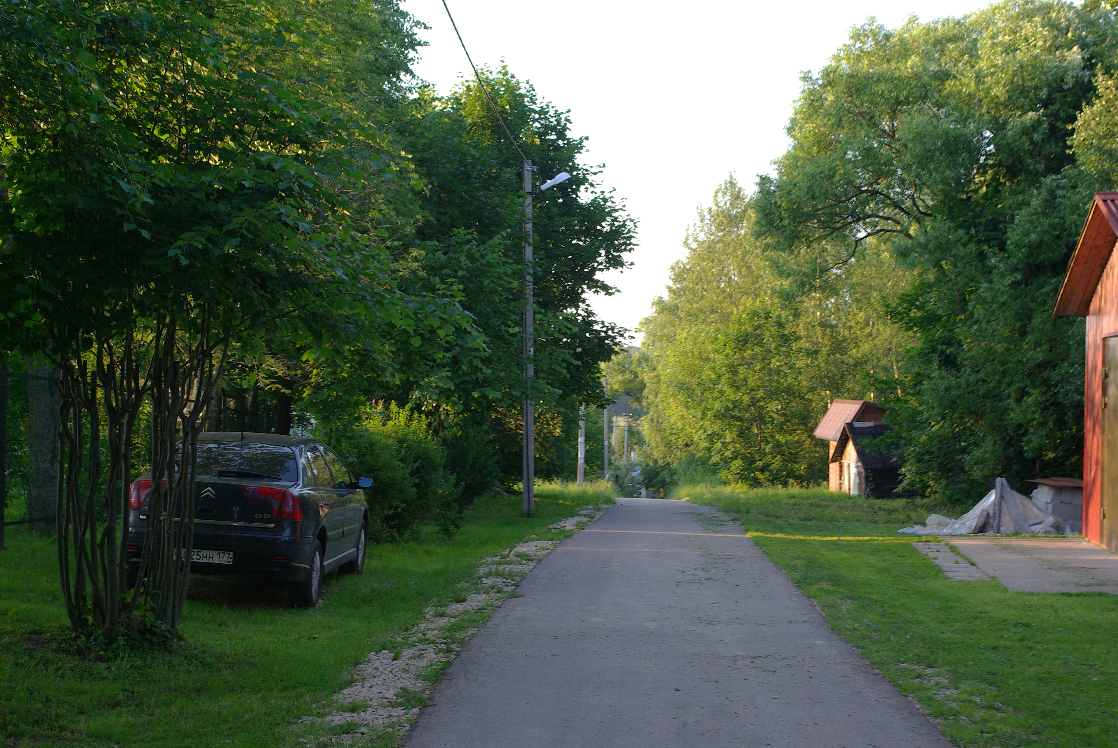 деревня